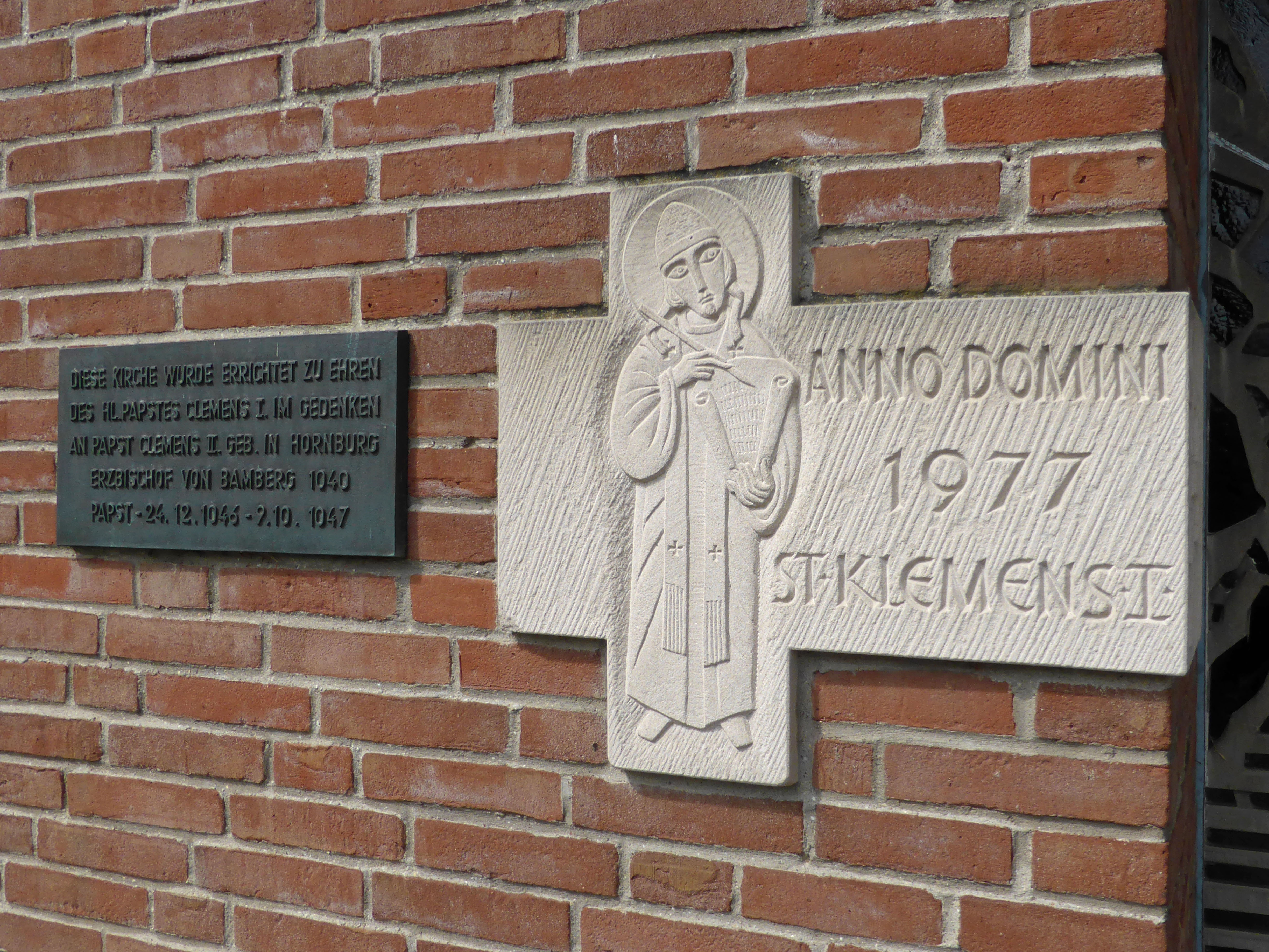 Grundstein der katholischen St.-Clemens-Kirche in Hornburg.